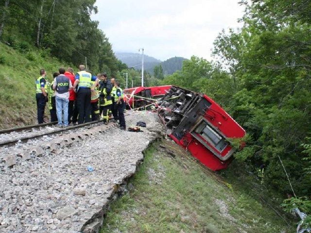 Unfallstelle bei Fiesch am Freitag, 23. Juli 2010. Rechts ein Fahrleitungsmast, der vom letzten Wagen des Zuges 906 weggedrückt wurde.